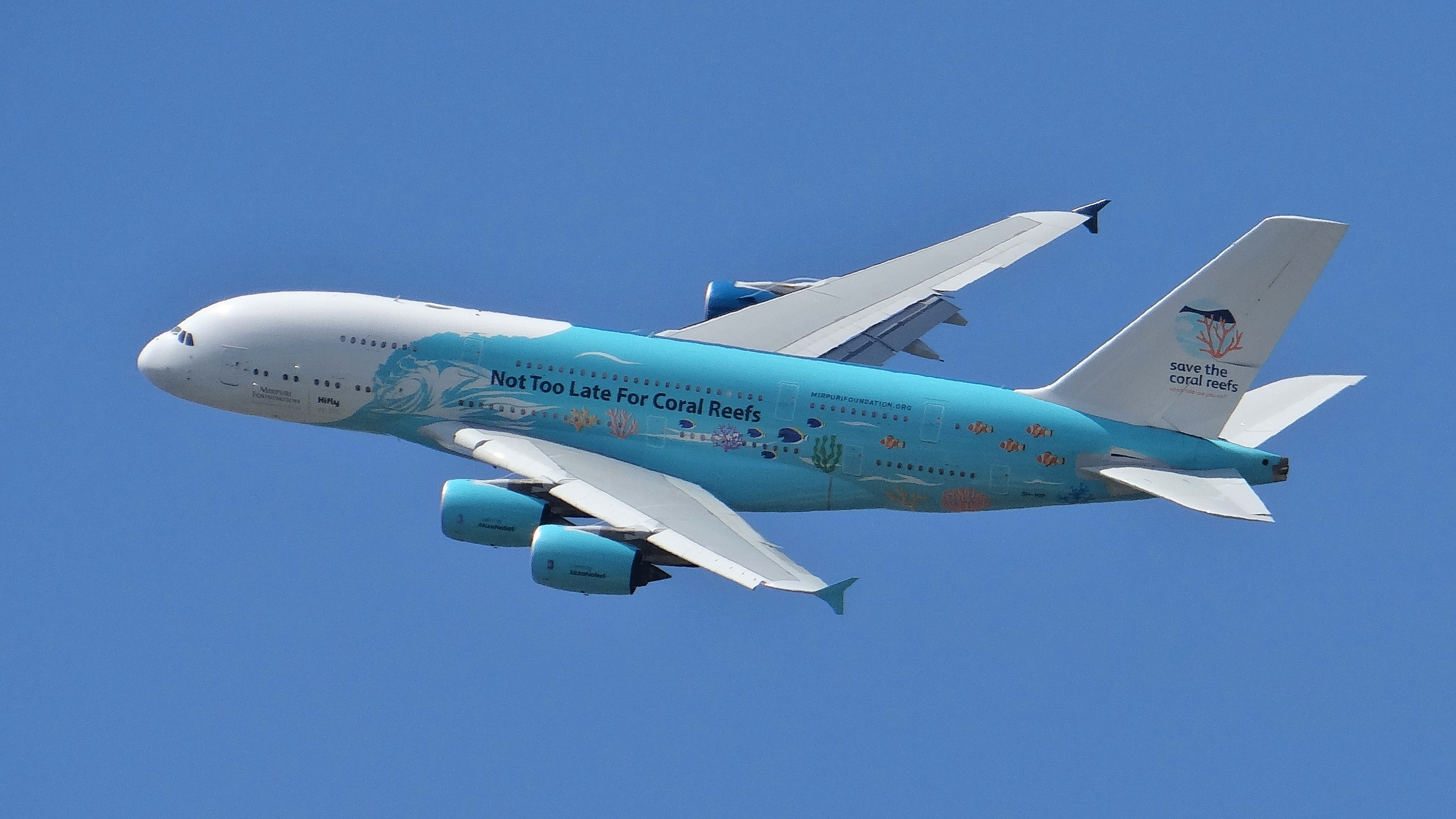 Airbus A380 9H-MIP, de la compagnie HiFly Malta en démonstration lors du Salon de Paris Le Bourget, juin 2019